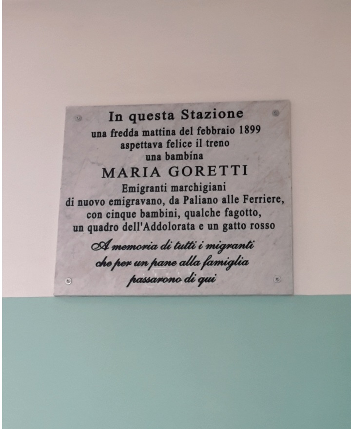 targa a memoria di Maria Goretti presso la stazione di Colleferro